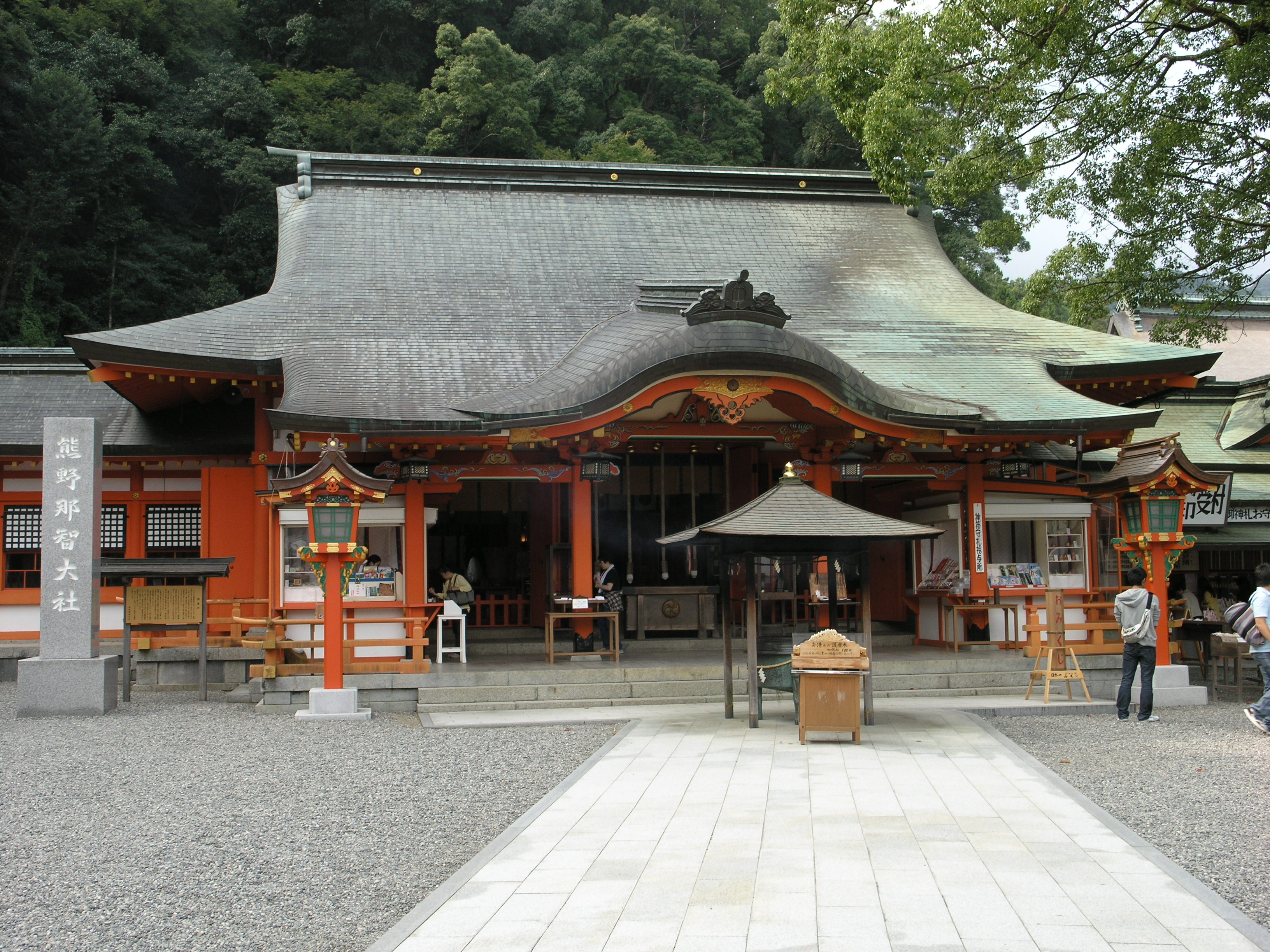 熊野那智大社 (和歌山県東牟婁郡那智勝浦町) 2008年10月撮影。 機材：C8080WZ 撮影者：Kansai explorer